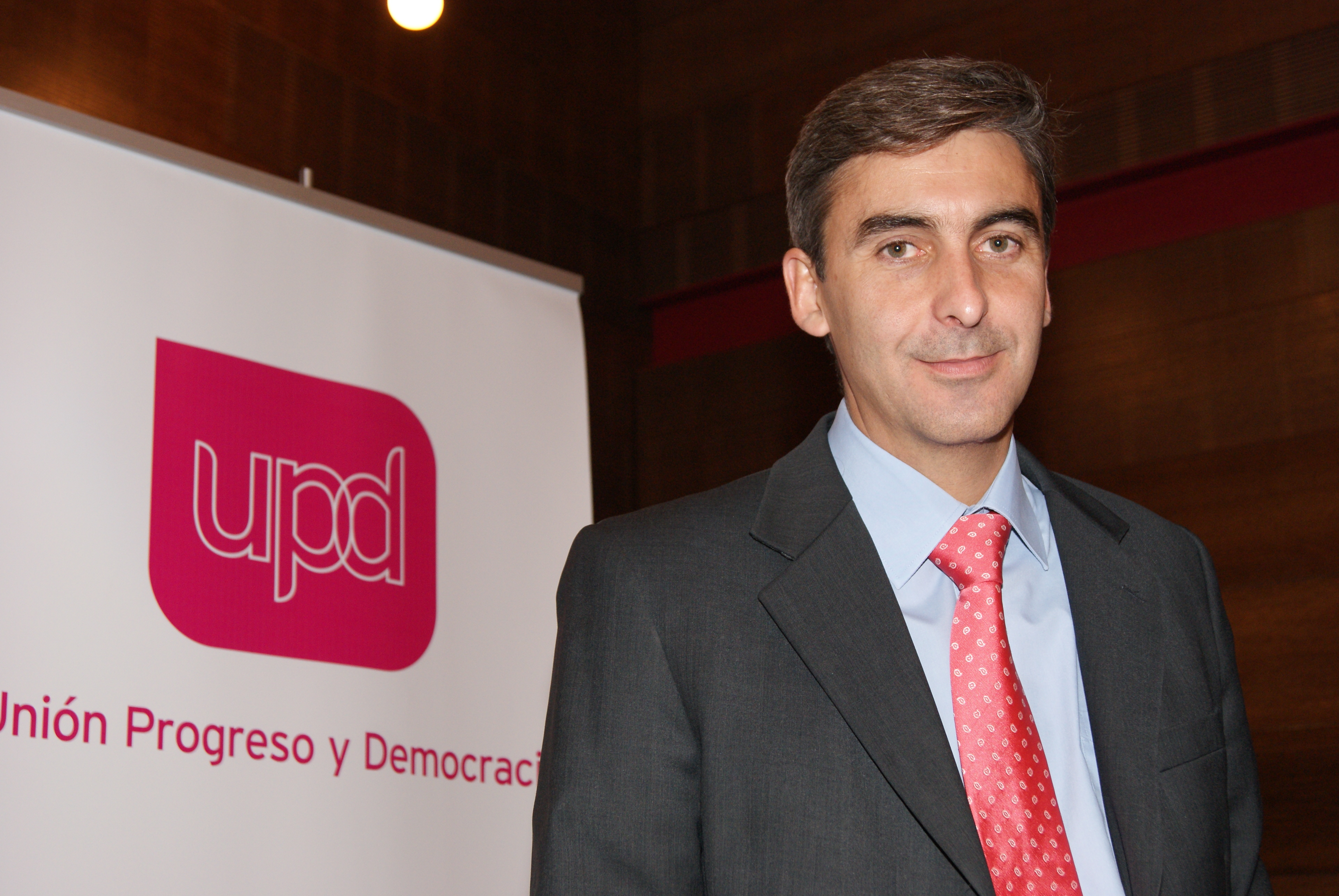 David Ortega, jurista y profesor español.